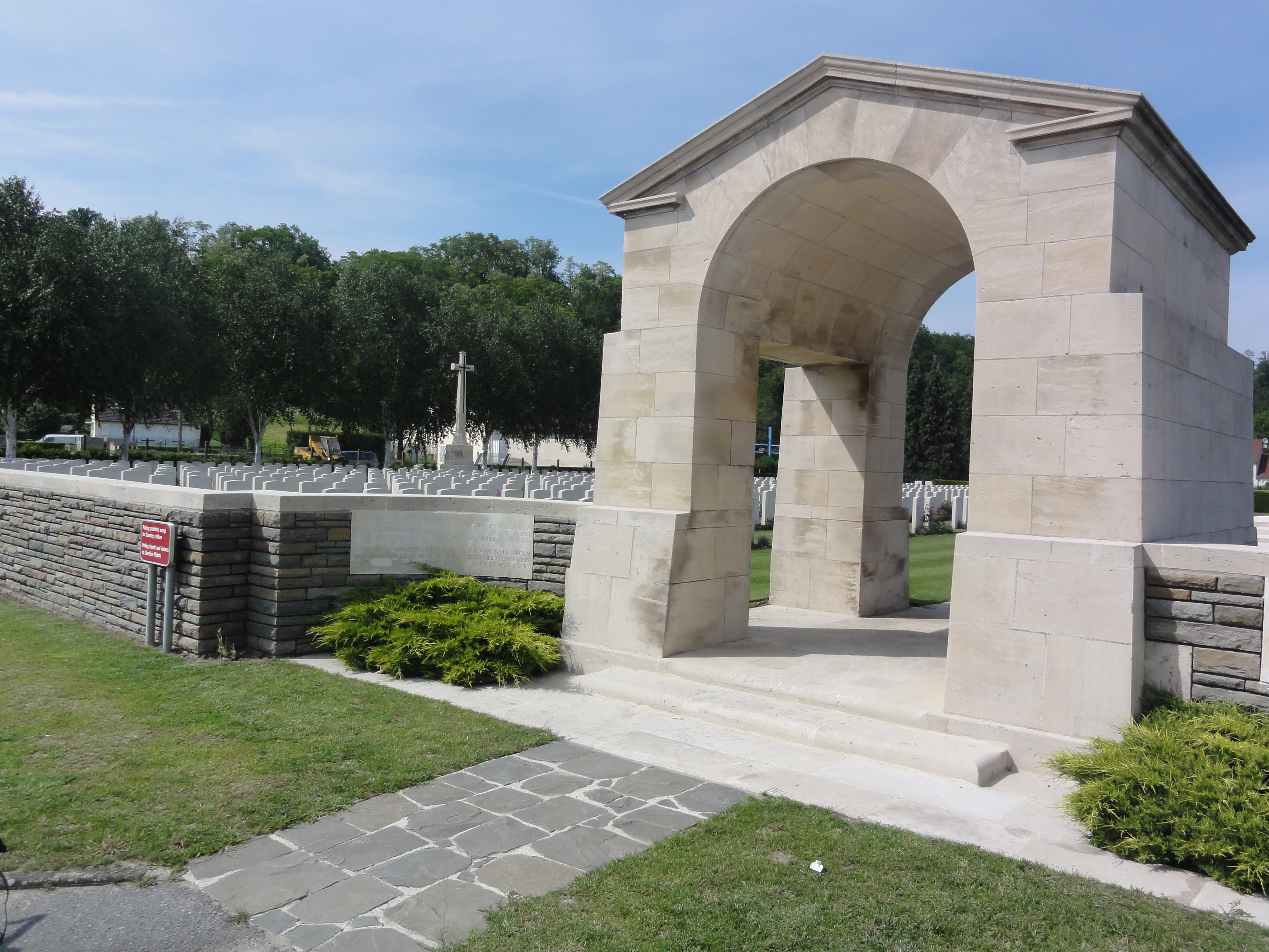 Vailly-sur-Aisne (Aisne) Cimetière brittannique (CWGC)